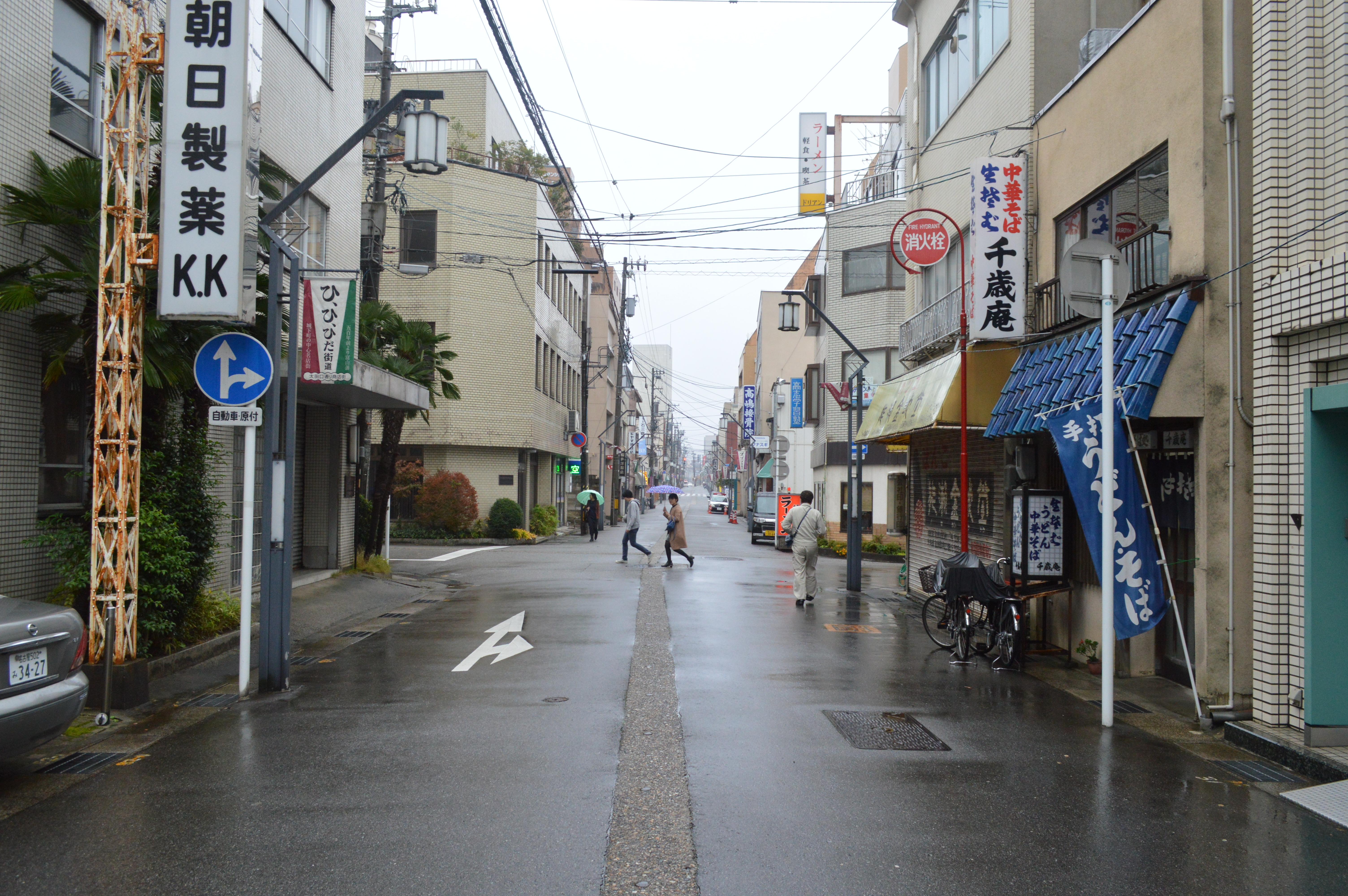 富山市の太田口通り（飛騨街道）にある太田口通り。